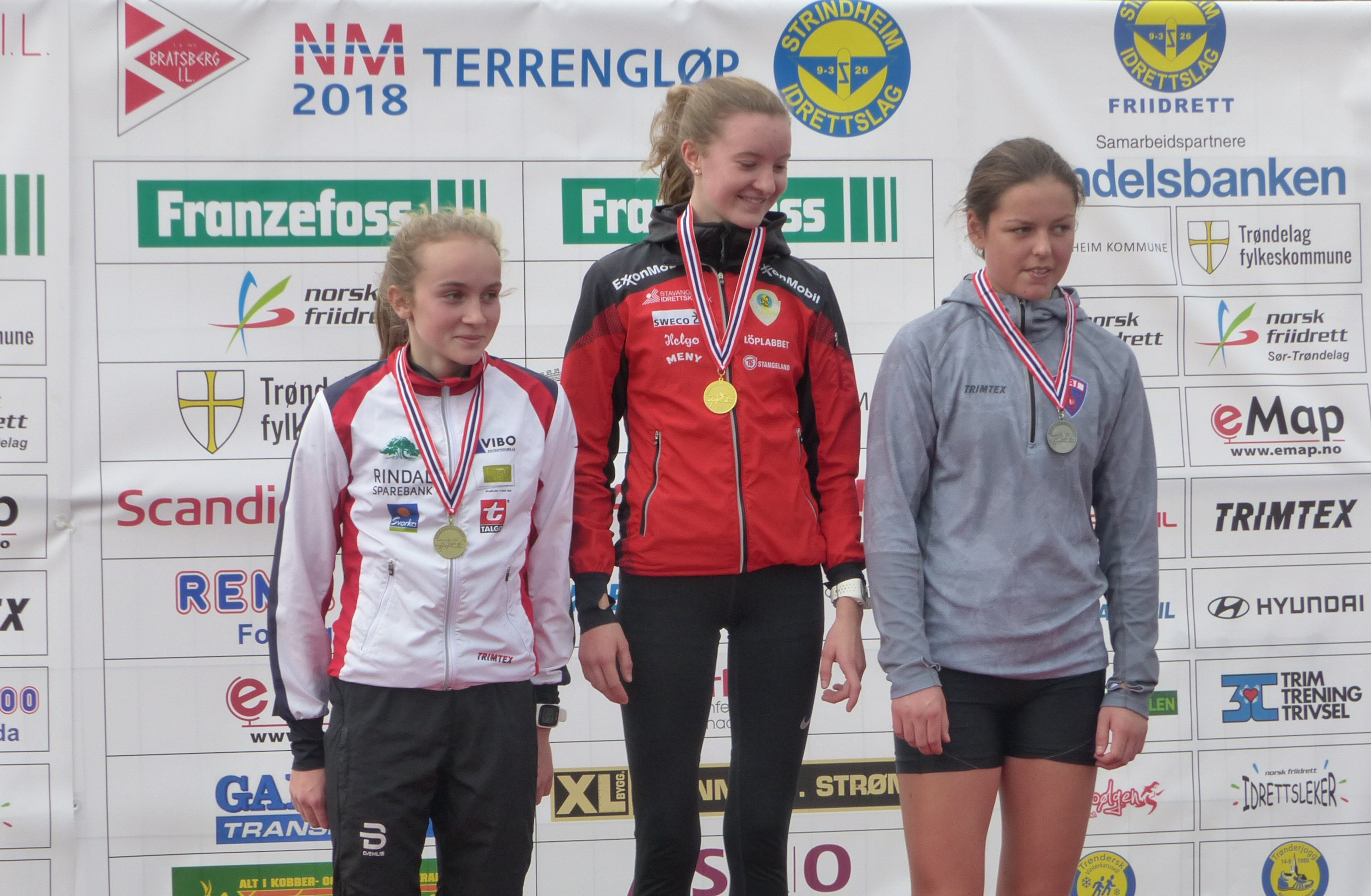 NM i terrengløp, lang løype, Bratsberg - Trondheim, 2018. Seierspallen for klassen J15.